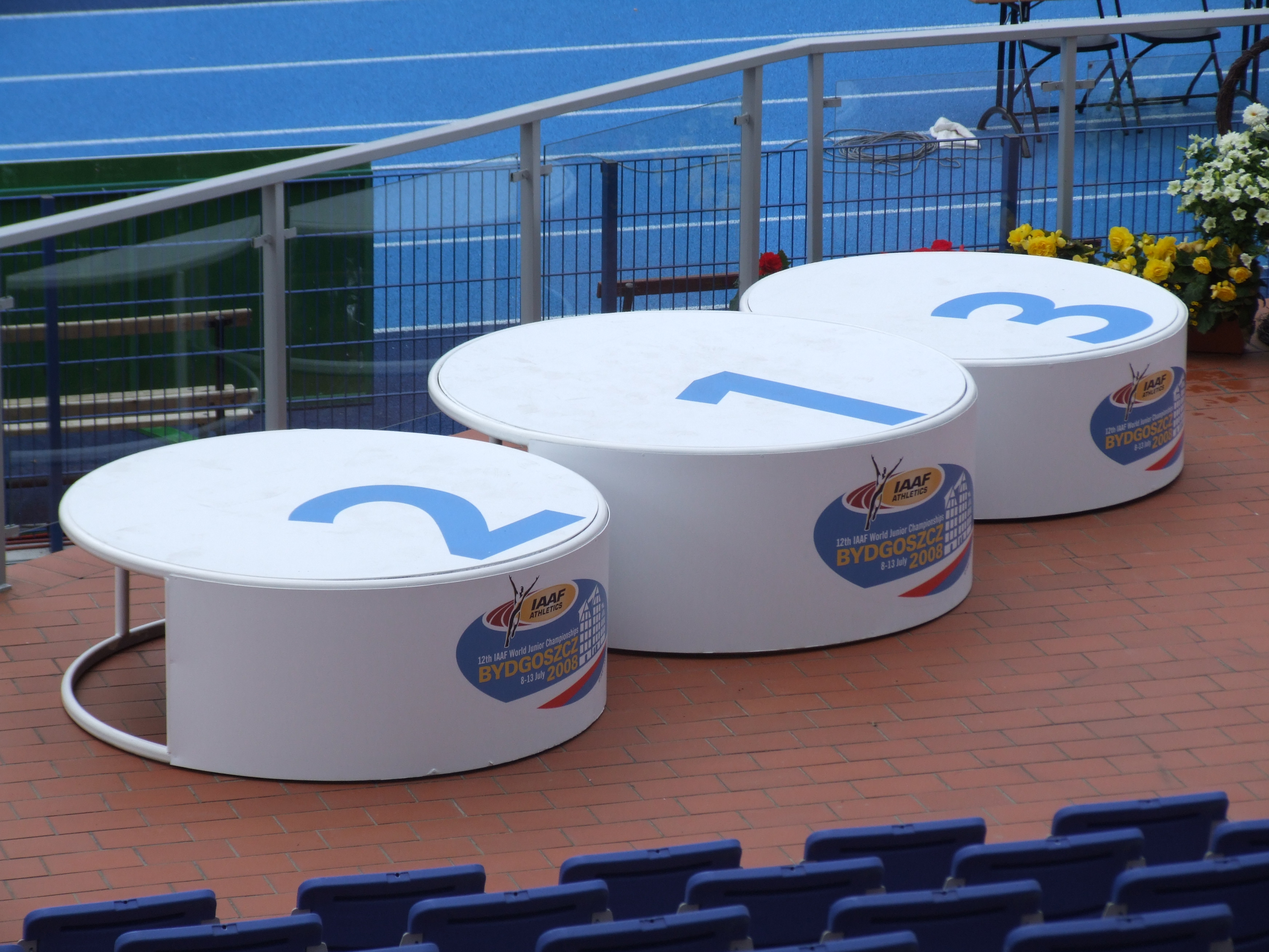 Stadion Zawiszy: 12. Mistrzostwa Świata Juniorów w Lekkeij Atletyce, Bydgoszcz, 8-13.07.2008